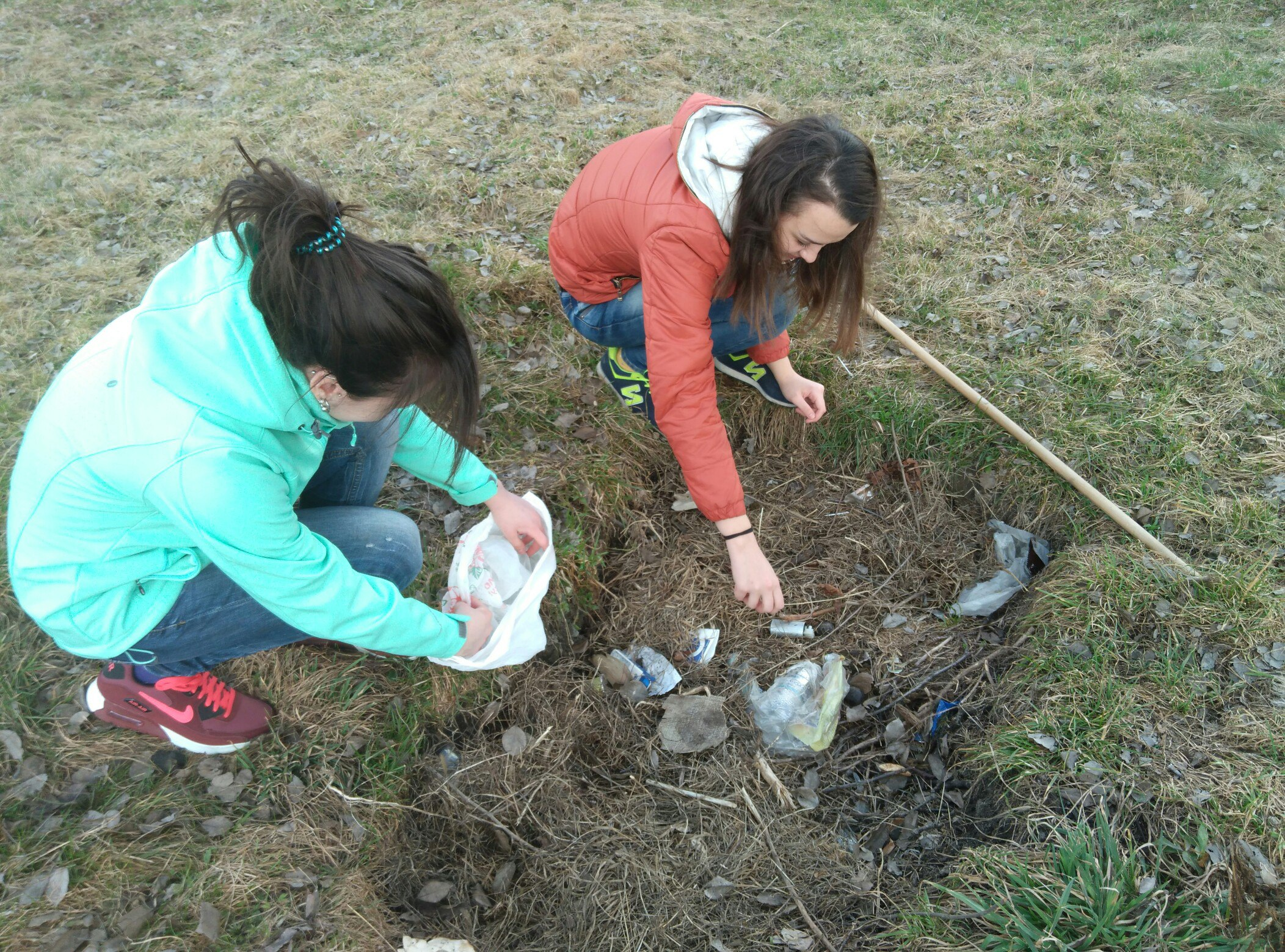 прибирання парку Веретинівський